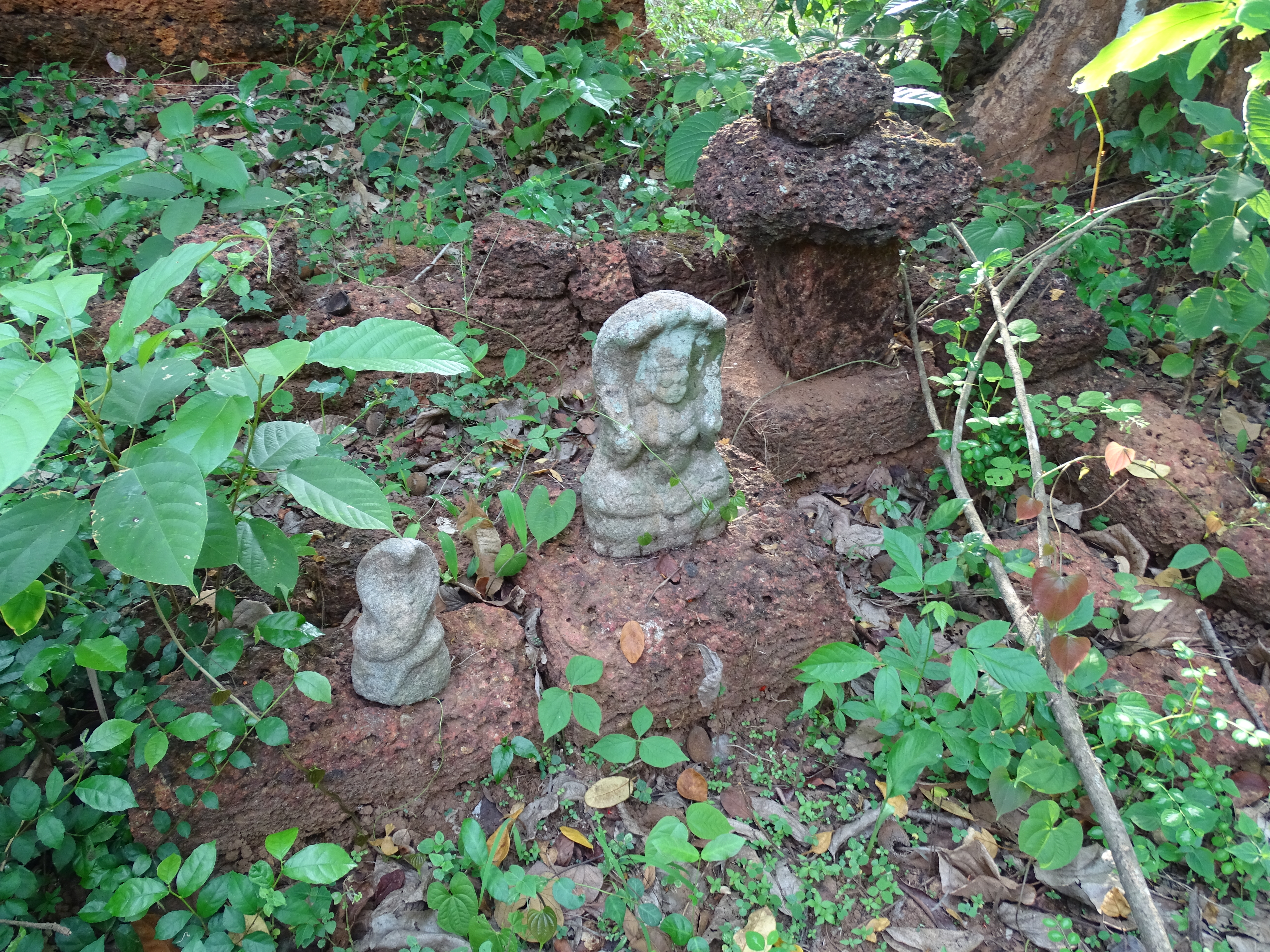 പാമ്പിന്‍കാവ്, ചിത്രകൂടക്കല്ല്